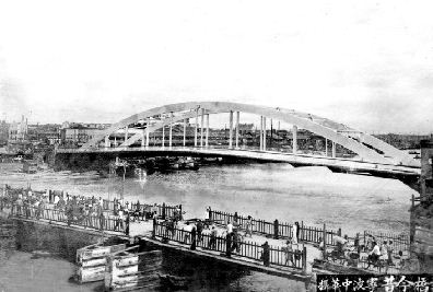 灵桥落成时照片